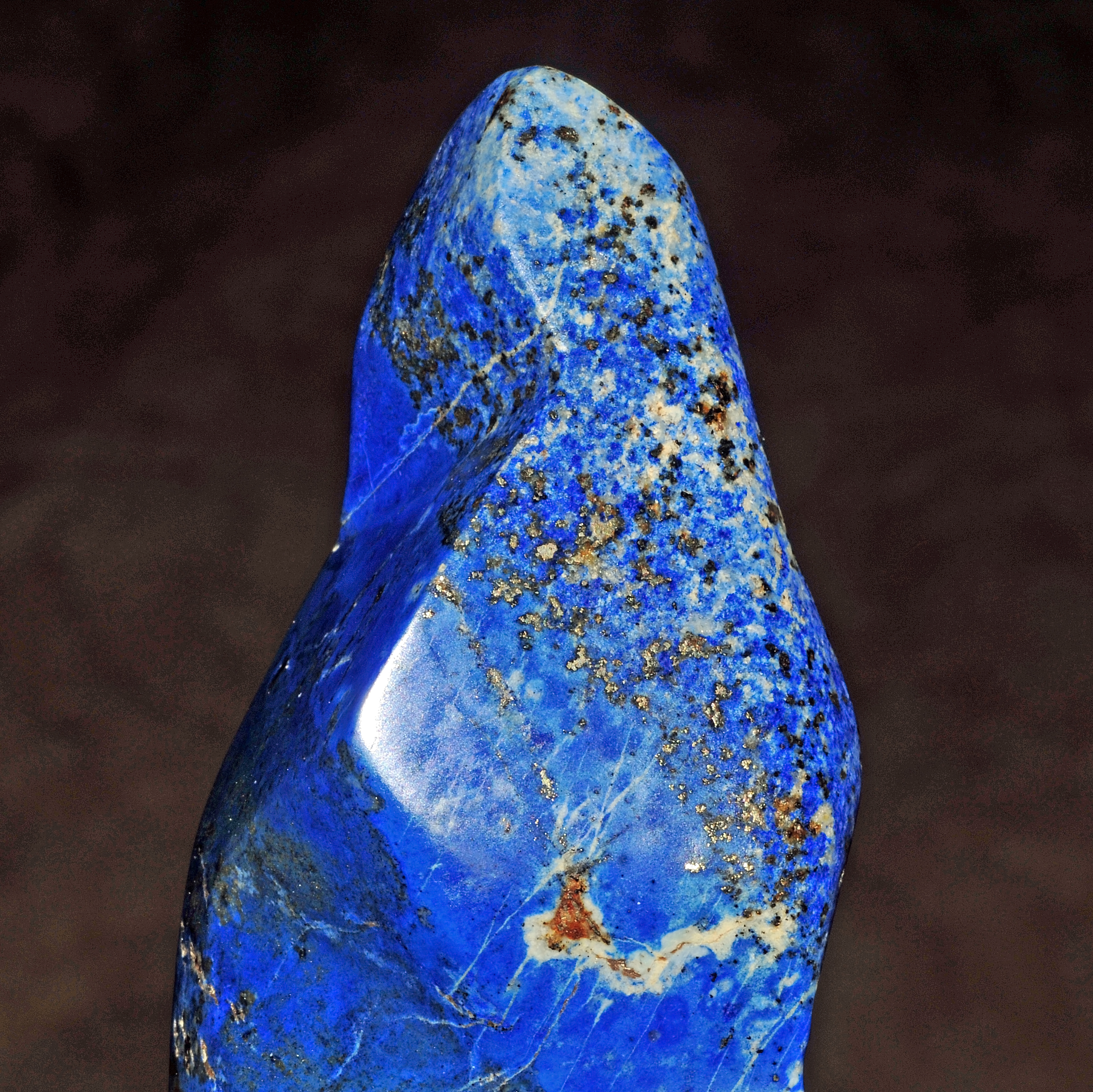 lazurite polie avec pyrite et calcite